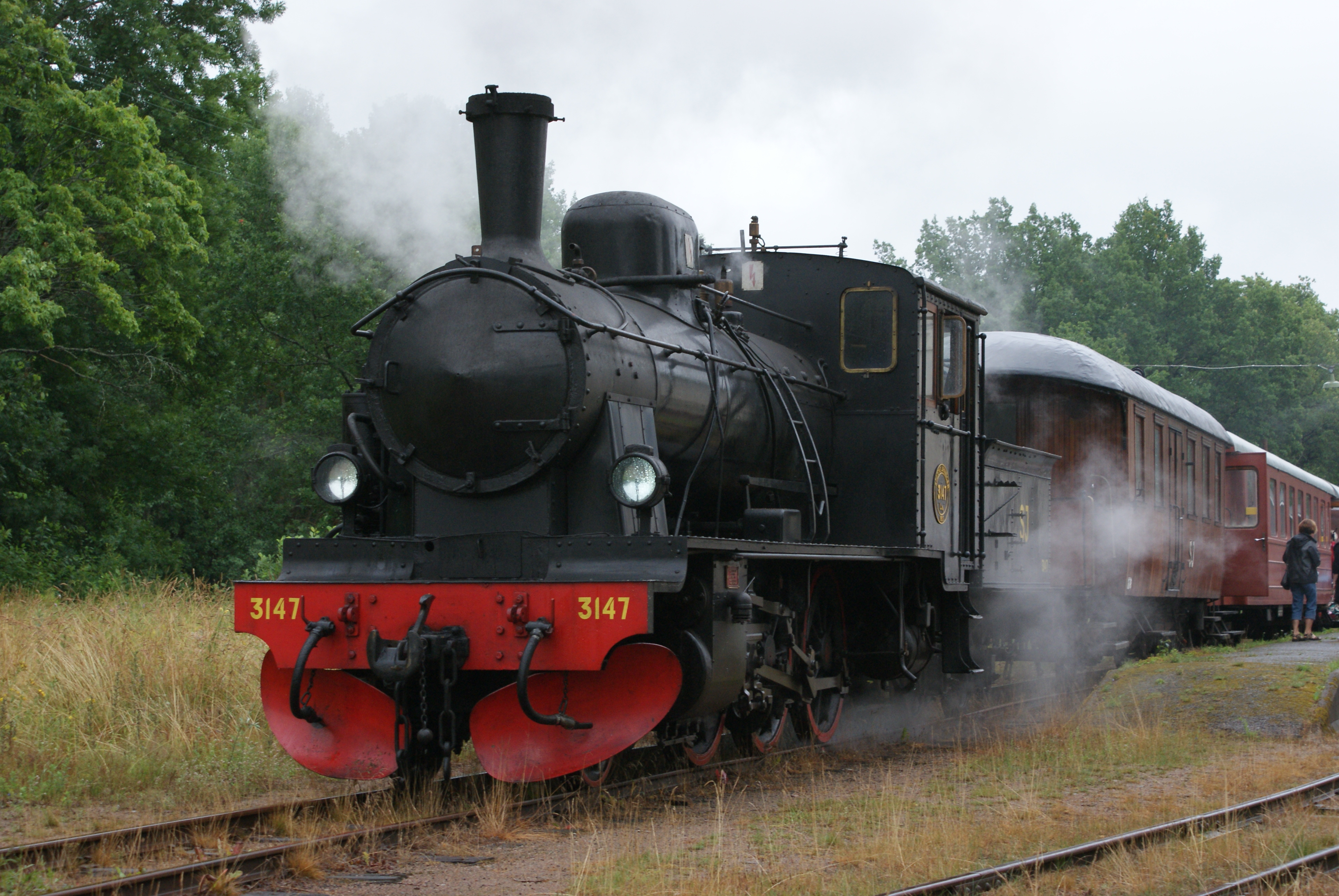 Ångloket SJ L18p 3147 i Ankarsrum 19.07.09